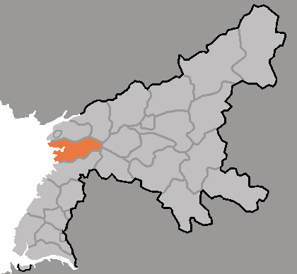 Map of Sukchon, Pyongan-namdo, DPRK, 2006